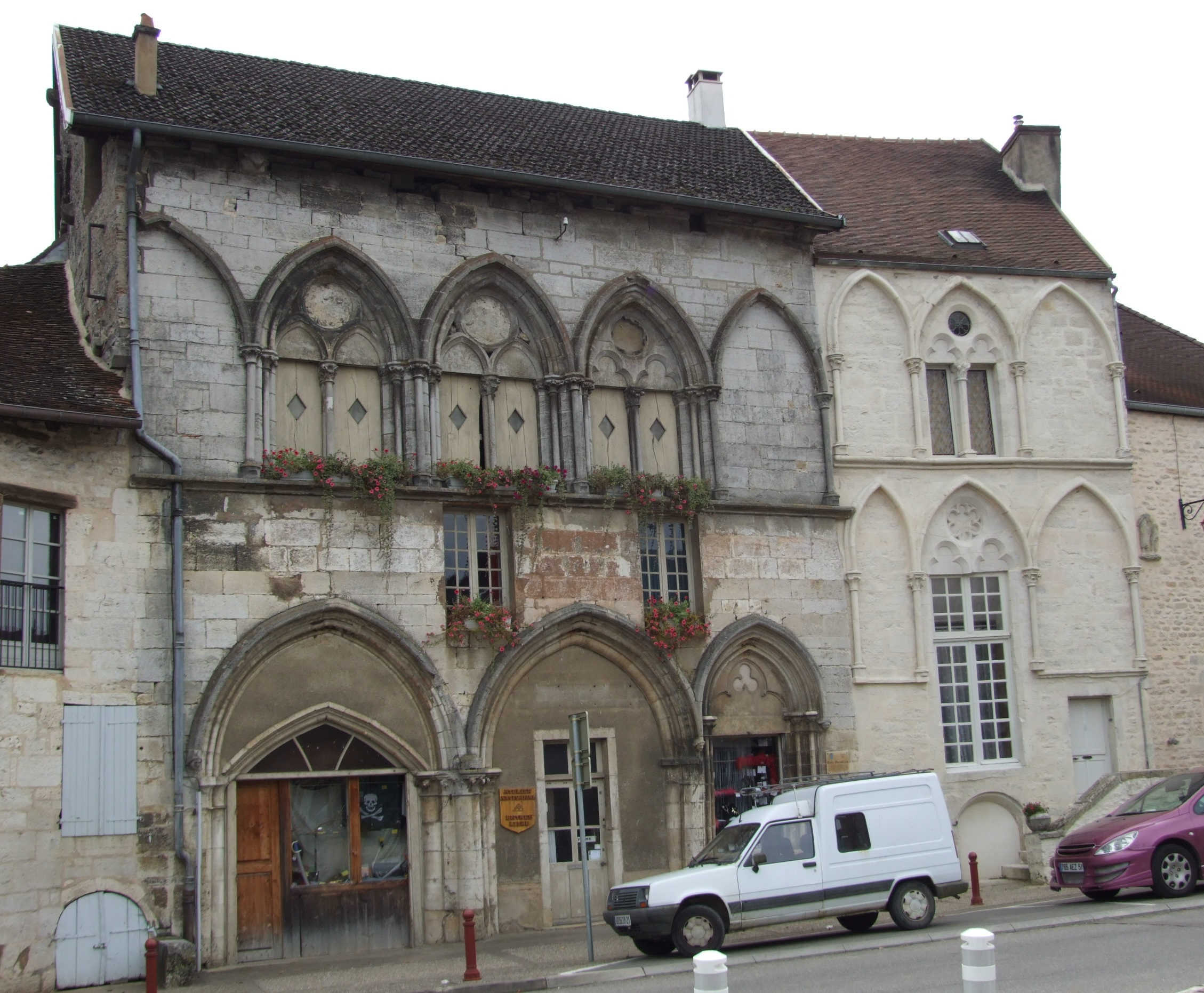 Bèze, Côte d'Or, Bourgogne, FRANCE